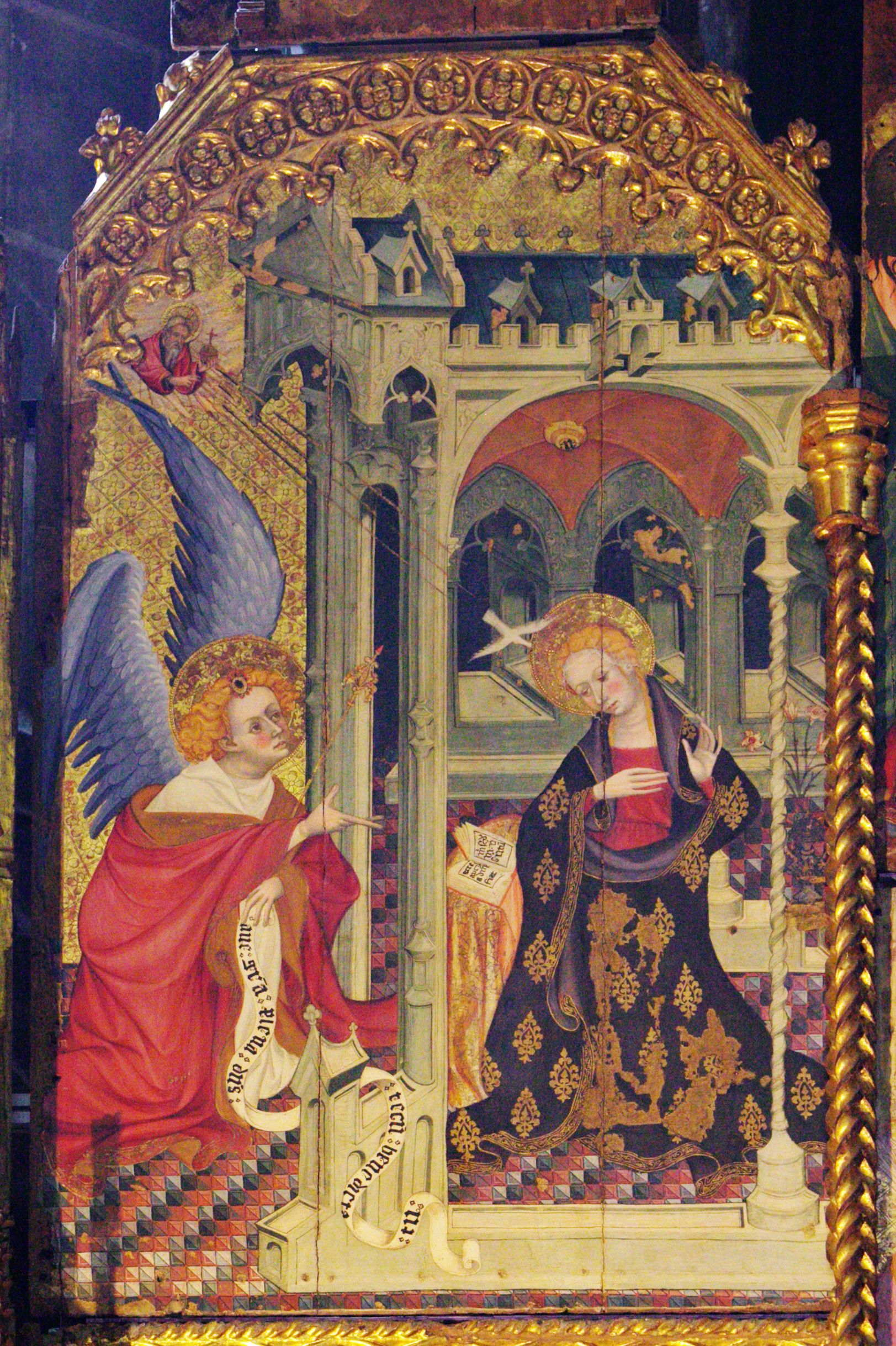 Taula de l'Anunciació de l'antic retaule gòtic del Monestir de Santes Creus. Actualment està muntat sobre una nova estructura formant un retaule més petit a la catedral de Tarragona